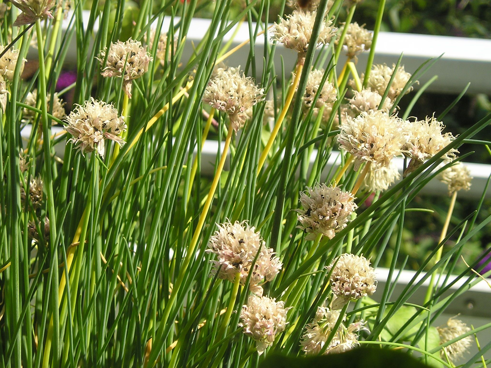 Schnittlauch mit Samenständen, Summer 2005